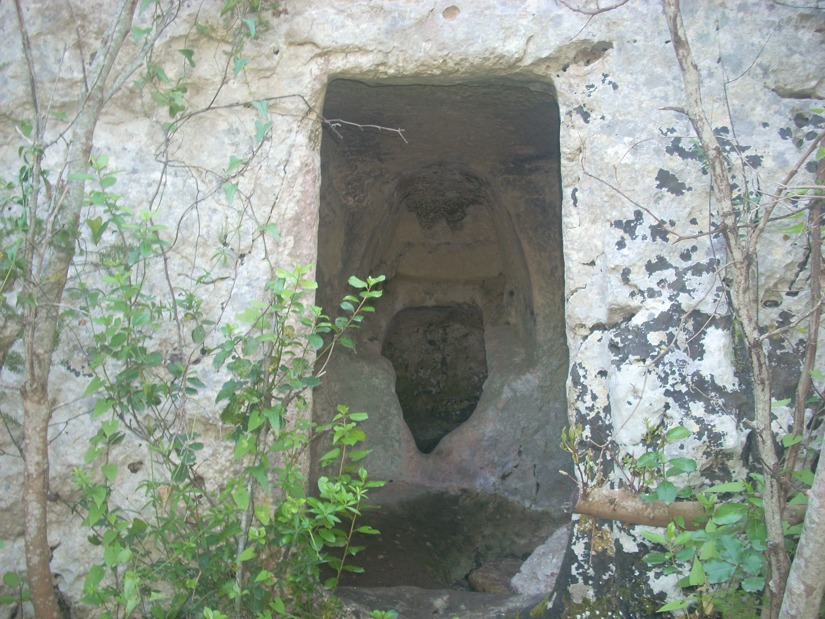 Solarino (SR), Necropoli di Cava del Rivettazzo, l'ingresso di una tomba.